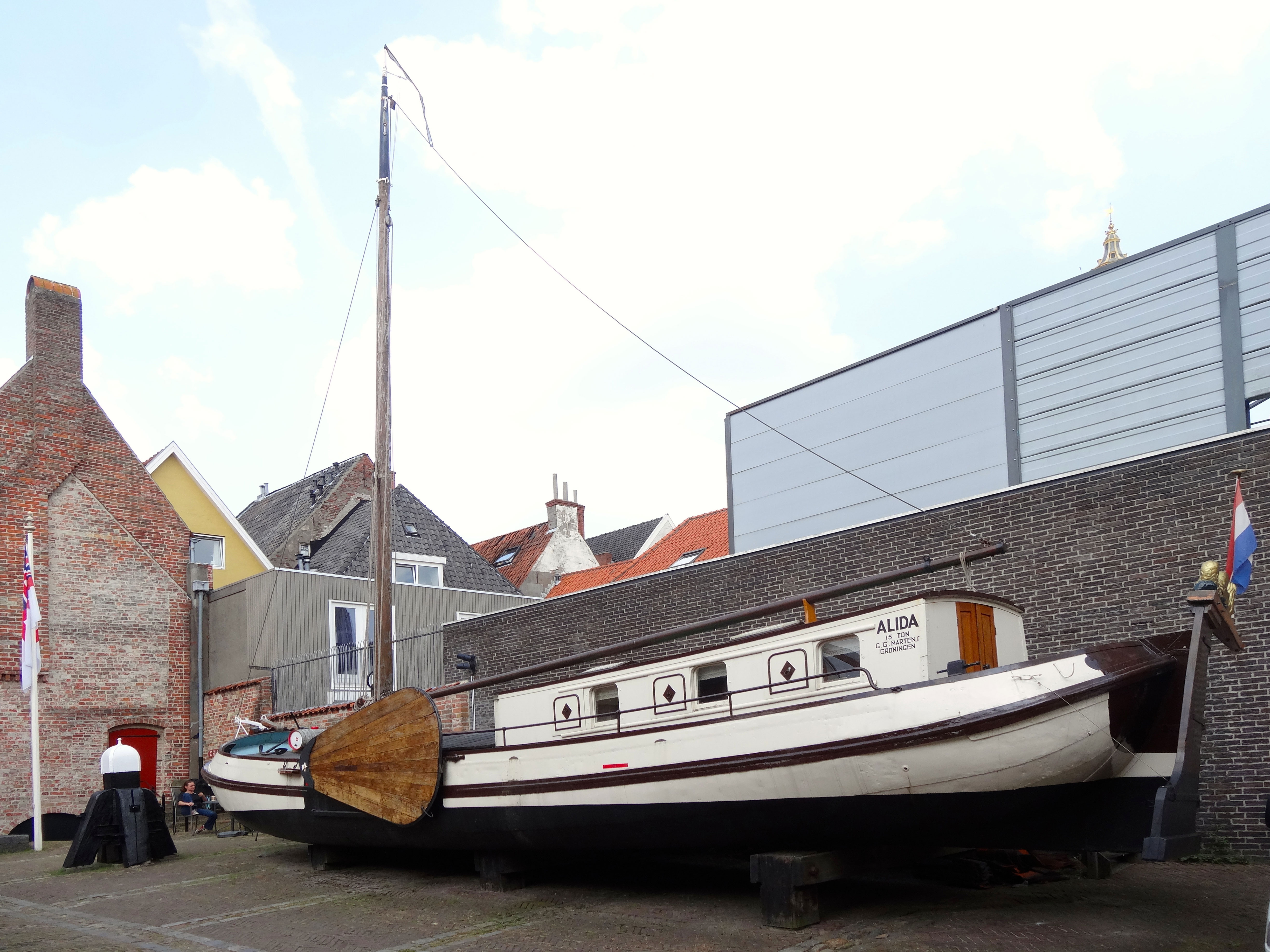 Tjalk Alida van de Groninger kunstschilder George Martens, genoemd naar zijn eerste vrouw Alida Jantina Pott